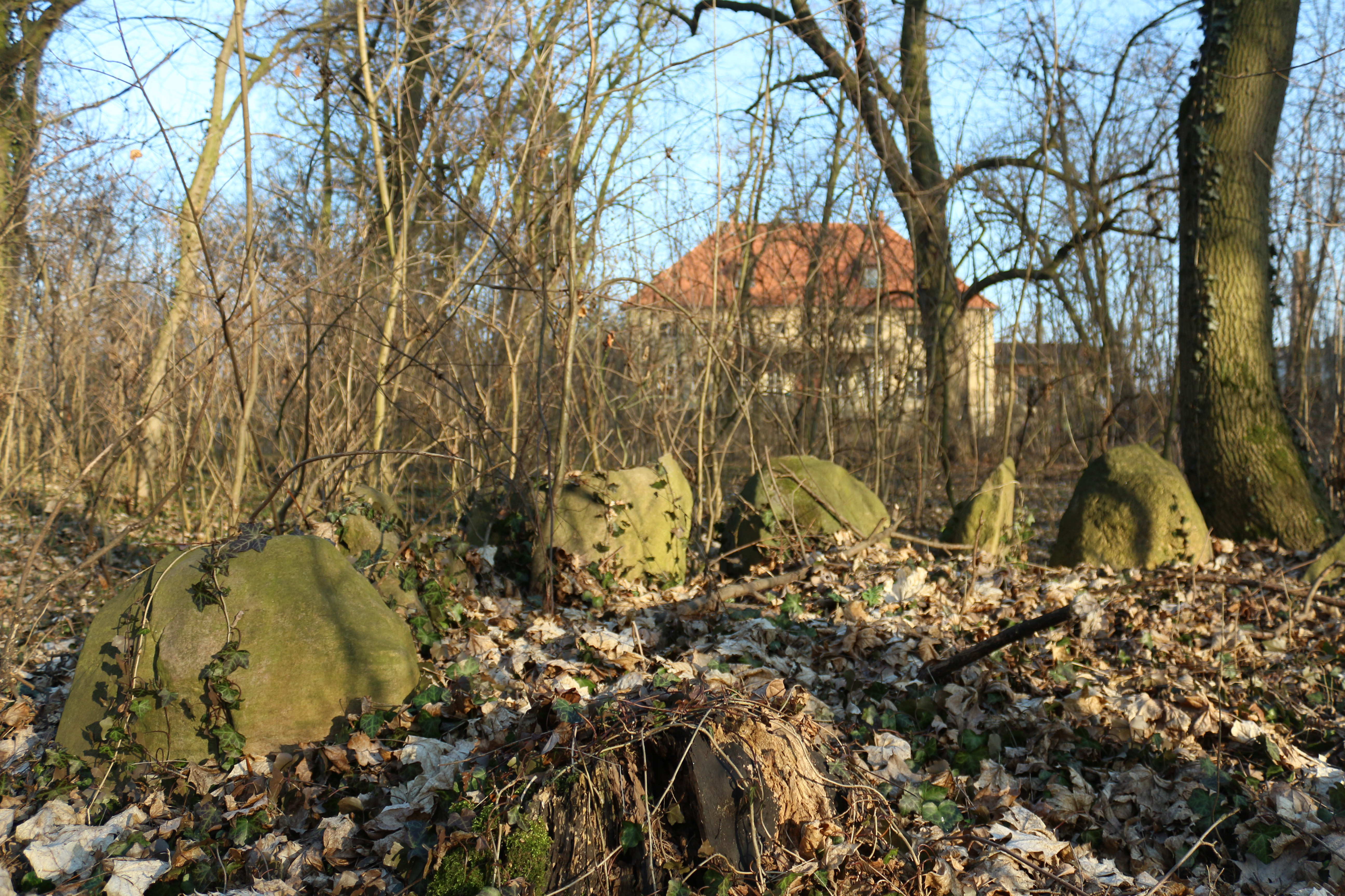 Stare Drzewce, zespół dworski i folwarczny, XIX